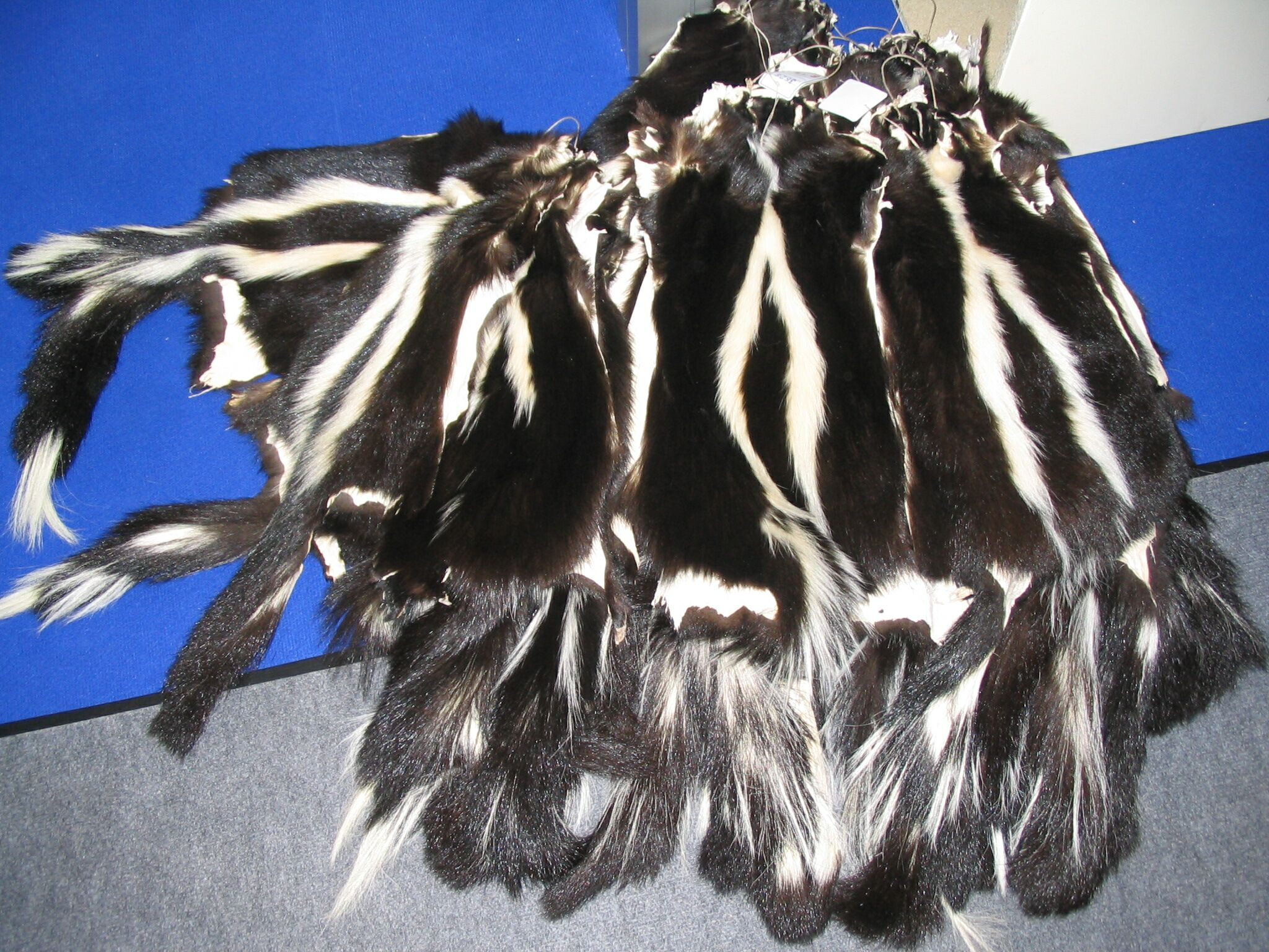 Skunks skins / Skunksfelle